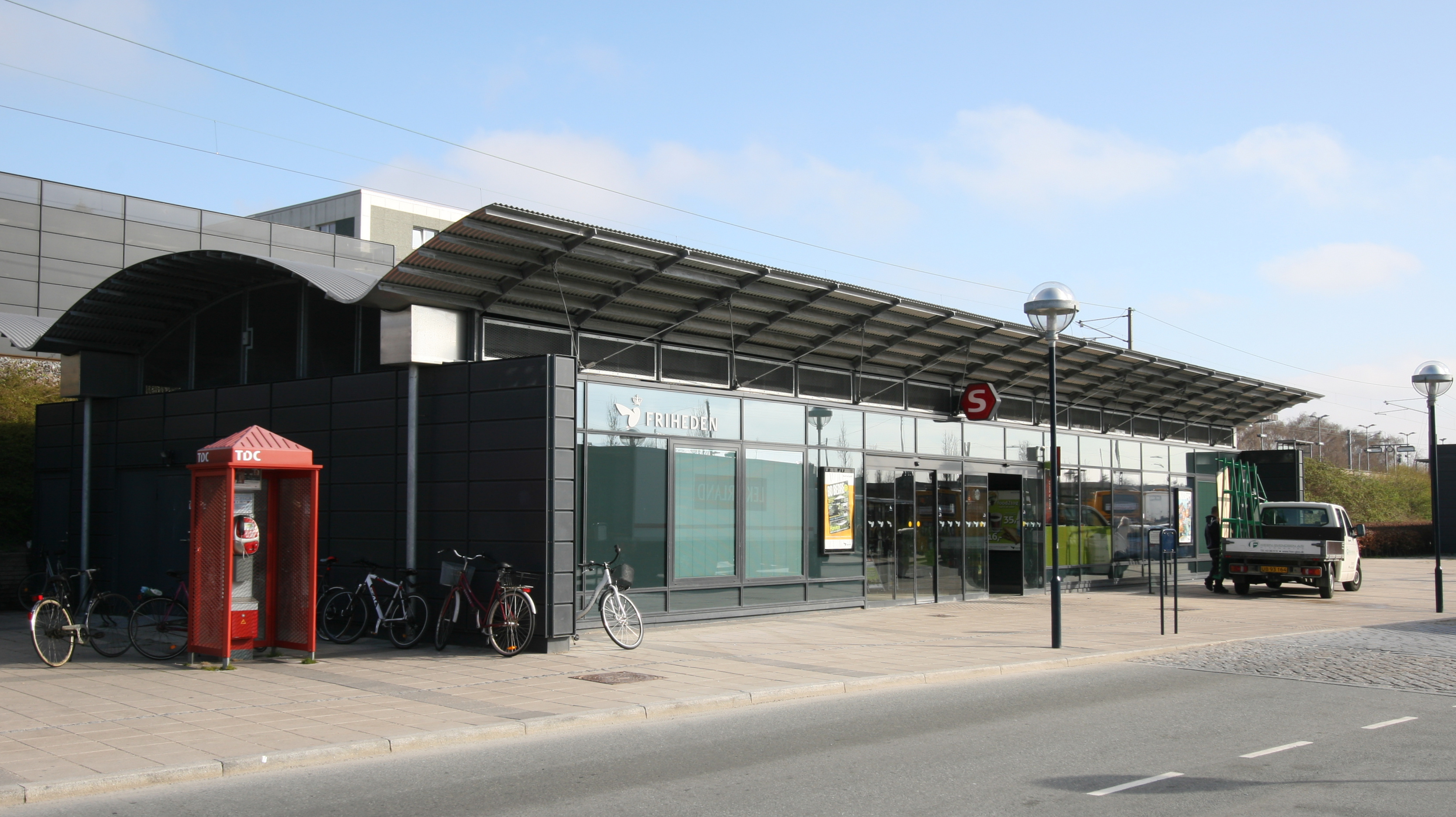 Friheden Station, Hvidovre, Denmark